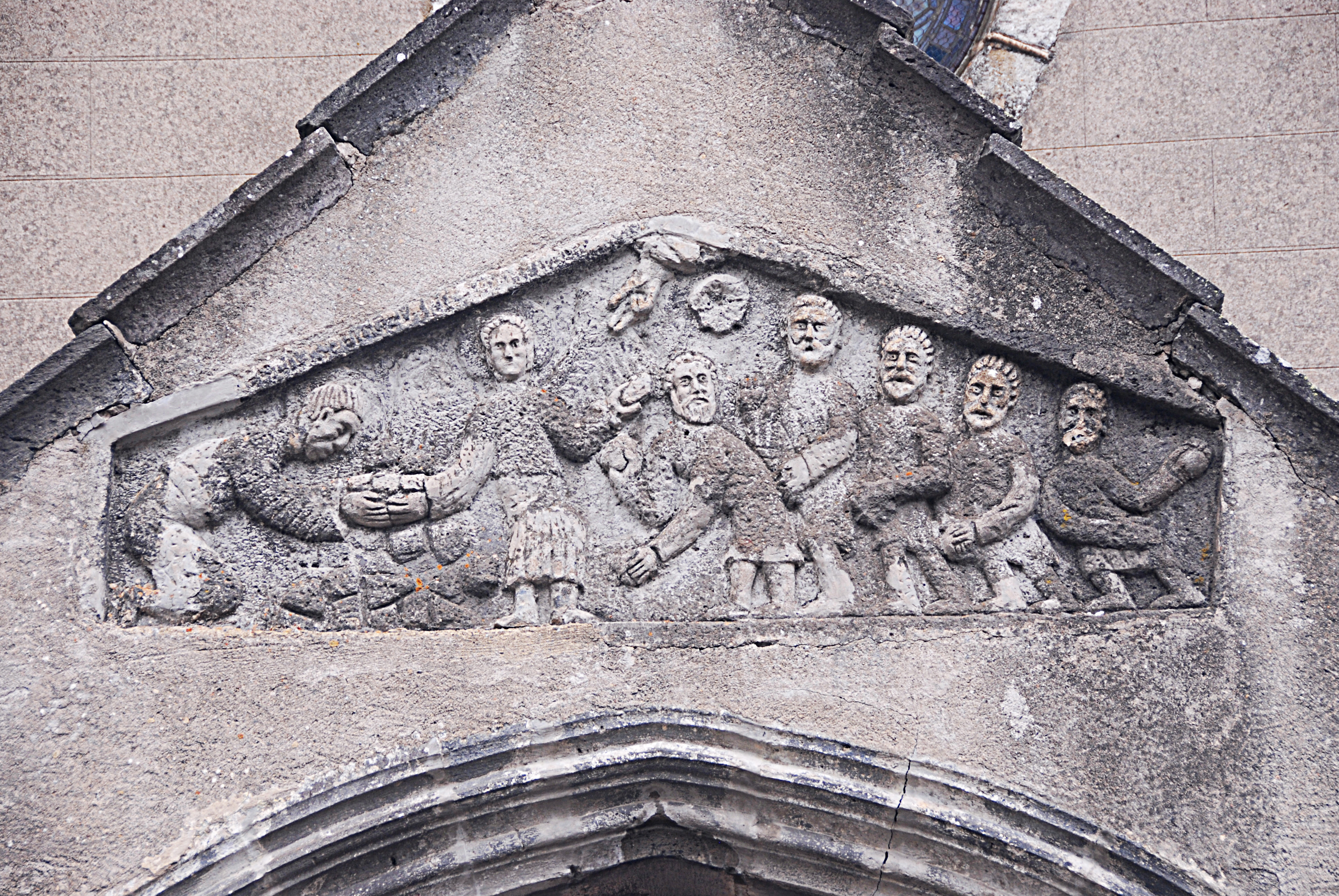 Dorfkirche Chambon-sur-Lac, Tympanon